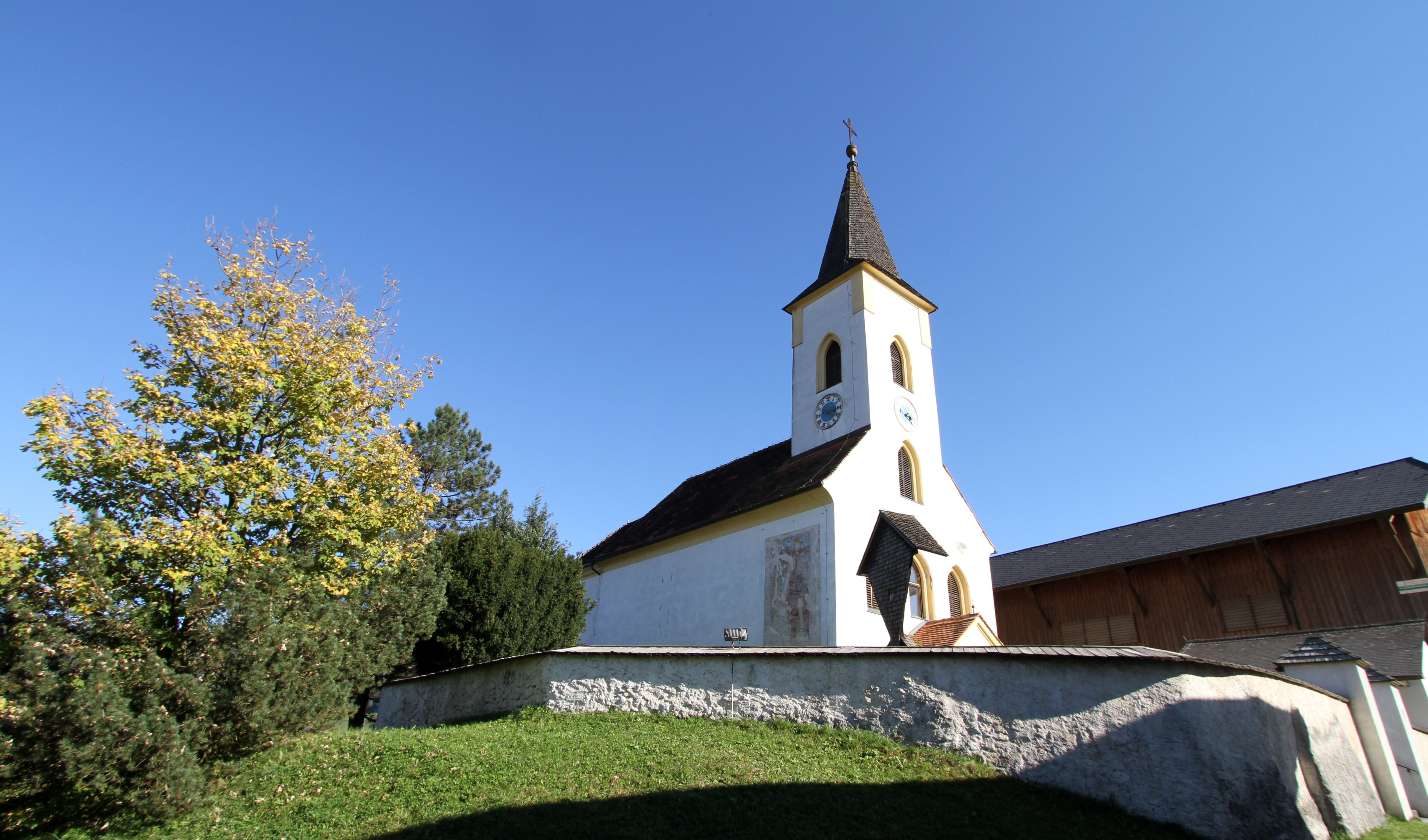 Kath. Pfarrkirche hl. Laurentius, Sankt Lorenzen bei Knittelfeld, Steiermark, Österreich